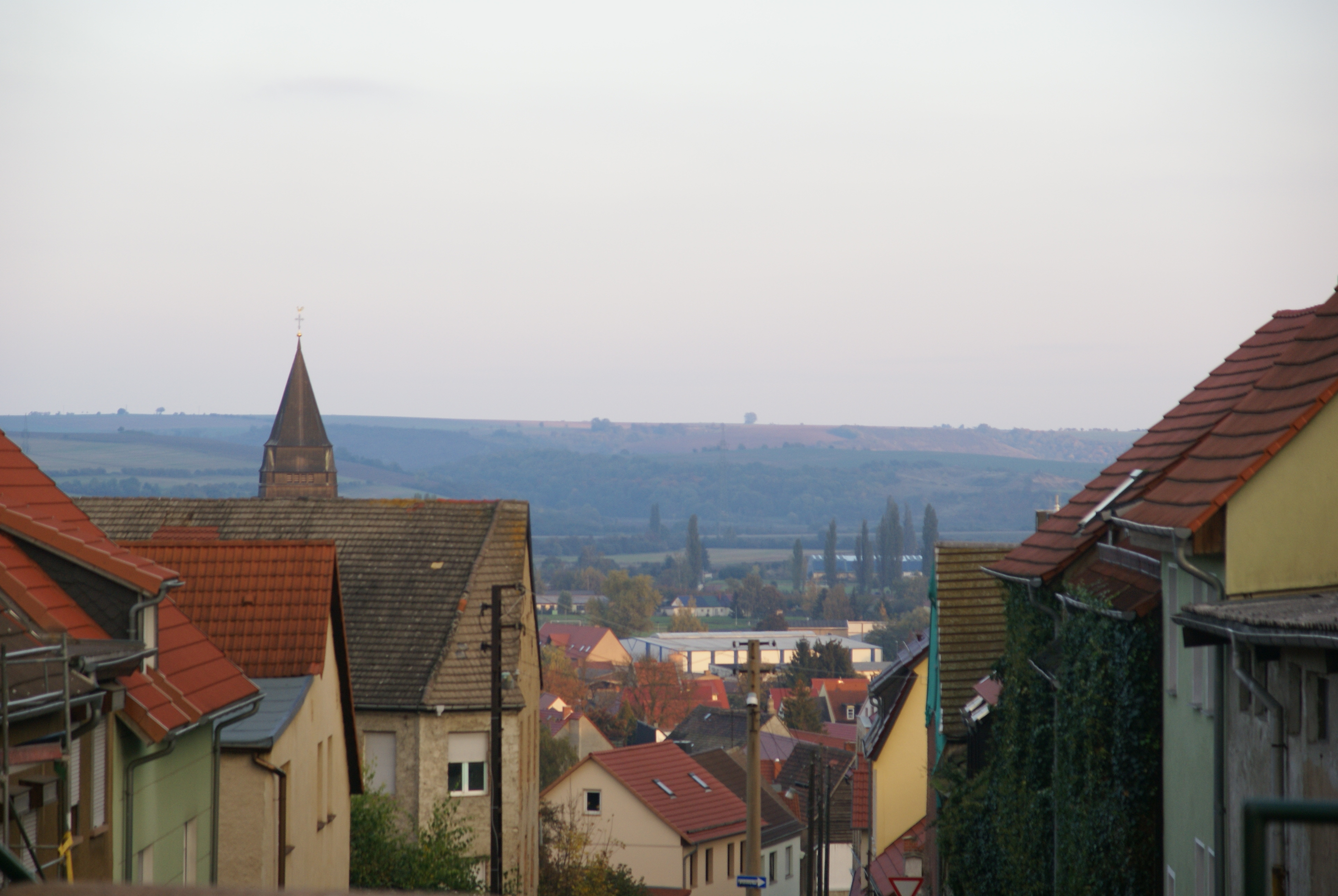 Blick über die Eisleber Niederung von einem Hügel im Süden der Lutherstadt Eisleben. Im Bildhintergrund ist die höher gelegene Mansfelder Platte zu sehen